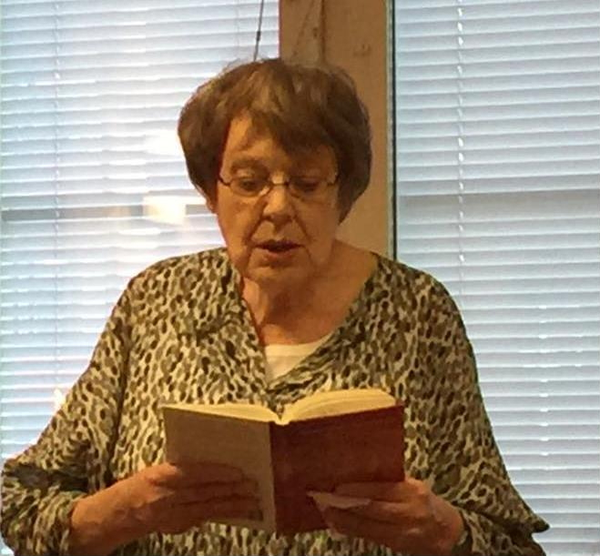 Ann-Marie Vinde läser Emily Dickinson